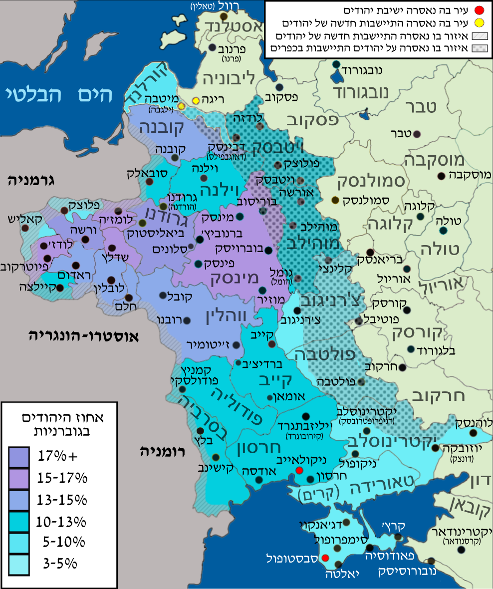 Административное деление России (западная часть) в 1917